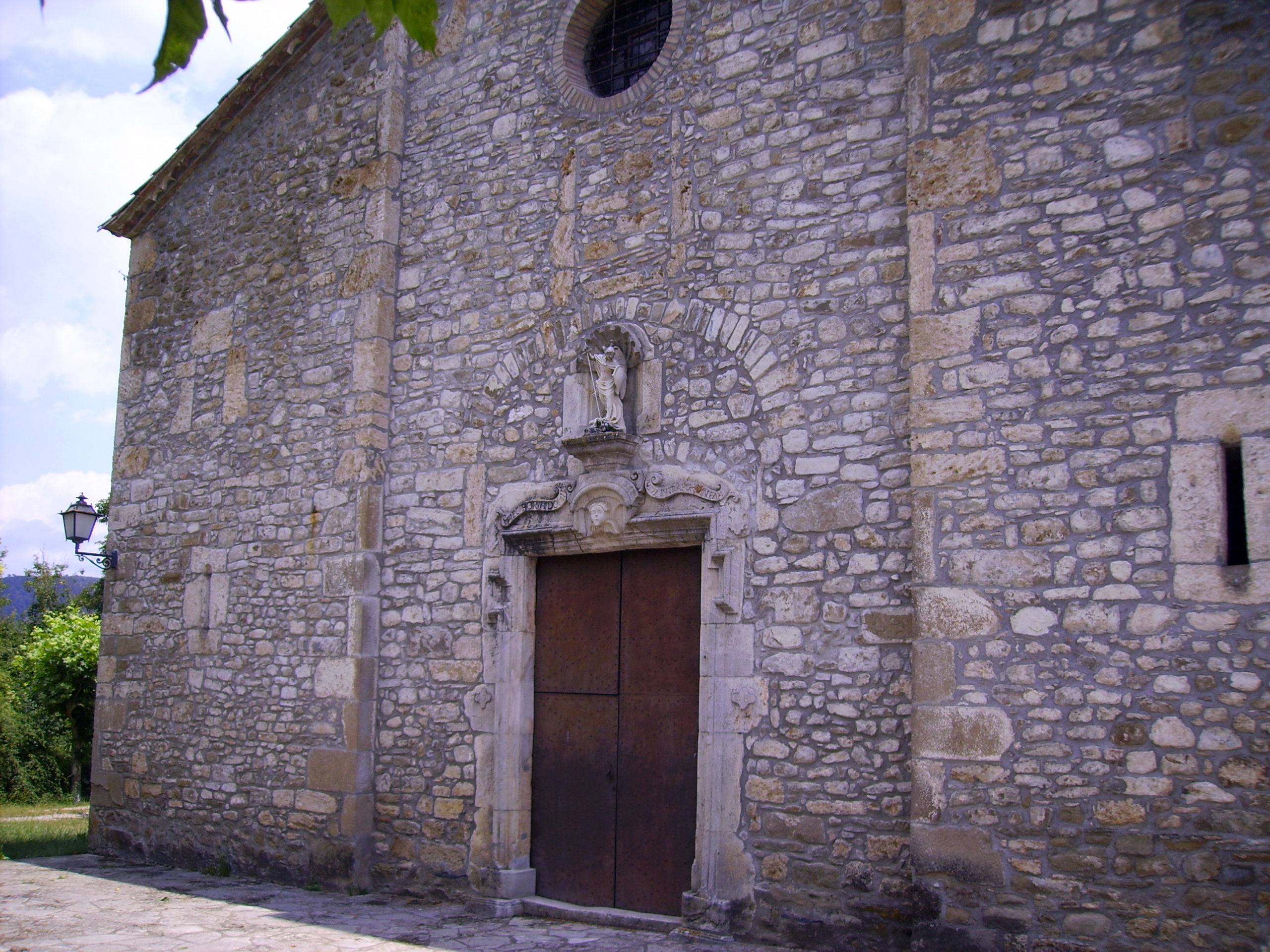 Església parroquial de Sant Miquel (Sant Miquel de Campmajor)